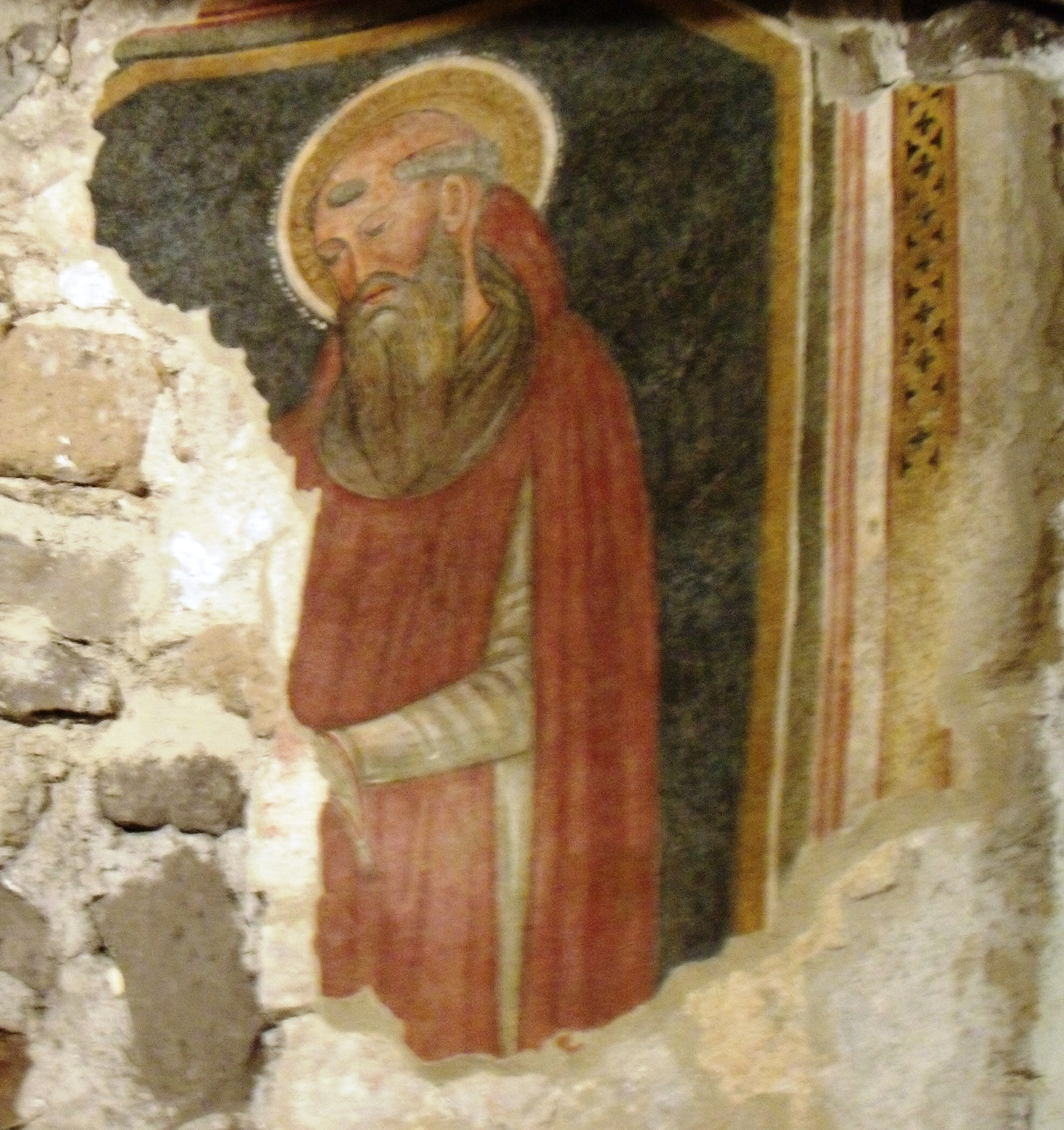 Affresco raffigurante San Benedetto (XI secolo) nell'Abbazia benedettina del Santissimo Salvatore in San Salvatore Telesino, provincia di Benevento.